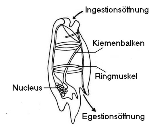 Salpe, innere Anatomie